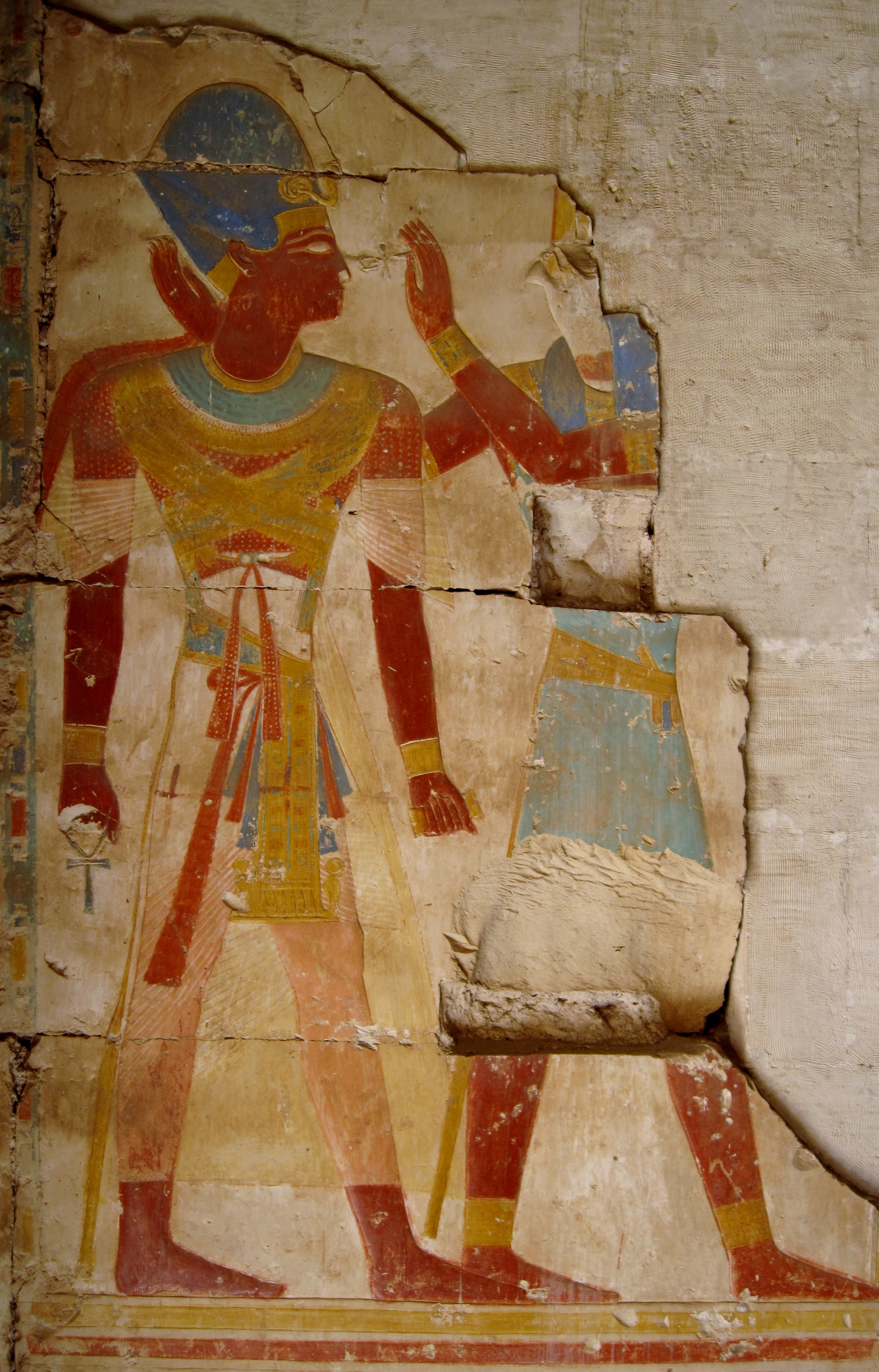 Relief im Tempel Ramses II. in Abydos, Ägypten